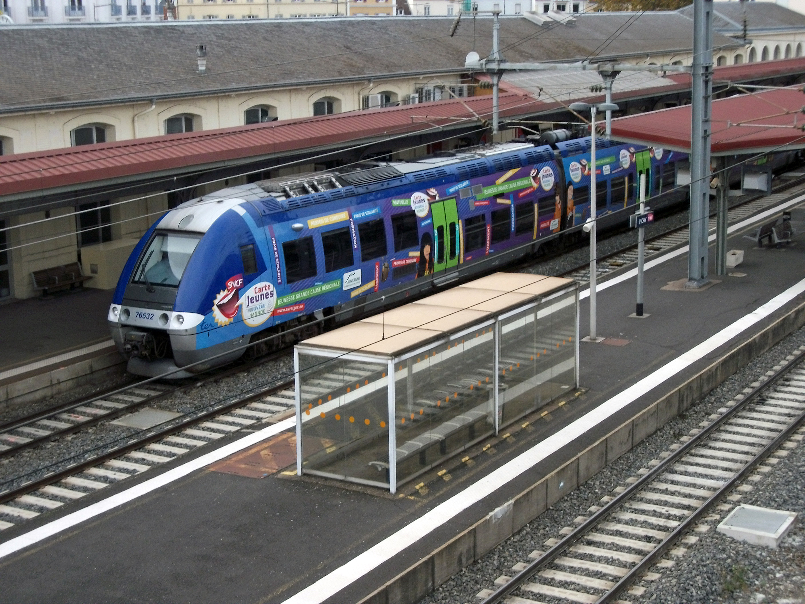 X 76531/532 en gare de Vichy. Après avoir assuré le TER 873358, ce train a effectué exceptionnellement un terminus à Vichy au motif de lourds travaux d'infrastructure au nord. Ce train continue normalement vers Moulins.